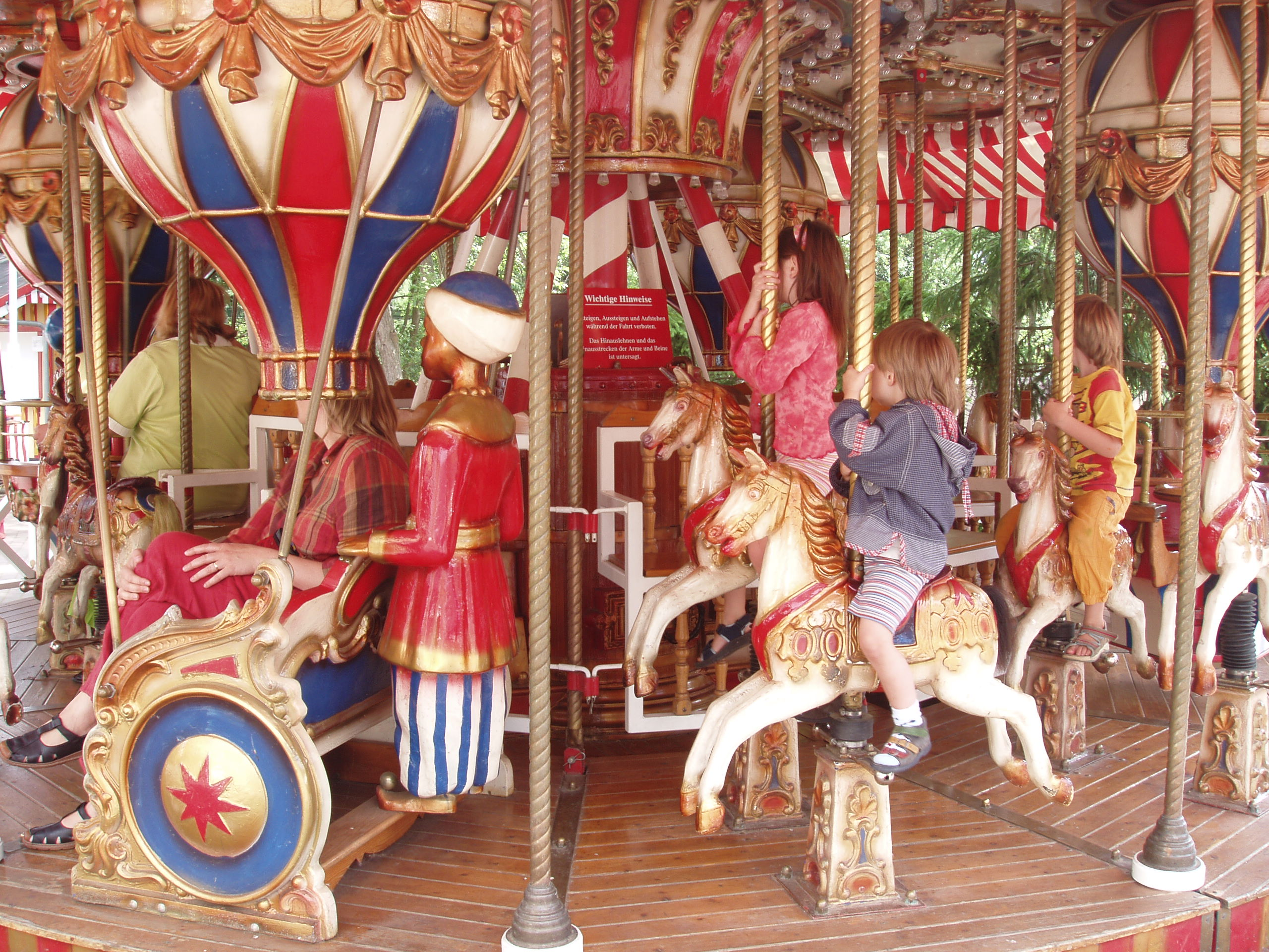 carrousel à vapeur allemand électrisé (Rastiland (Basse-Saxe)), source: auteur: moi-même